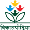 logo